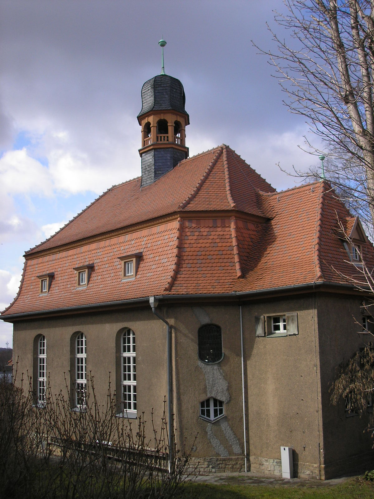 Die Lukaskirche in Erfurt-Daberstedt (Thüringen).